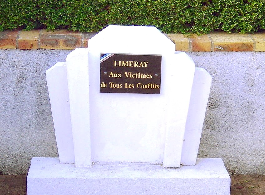 Monument aux morts de Limeray Indre-et-Loire France